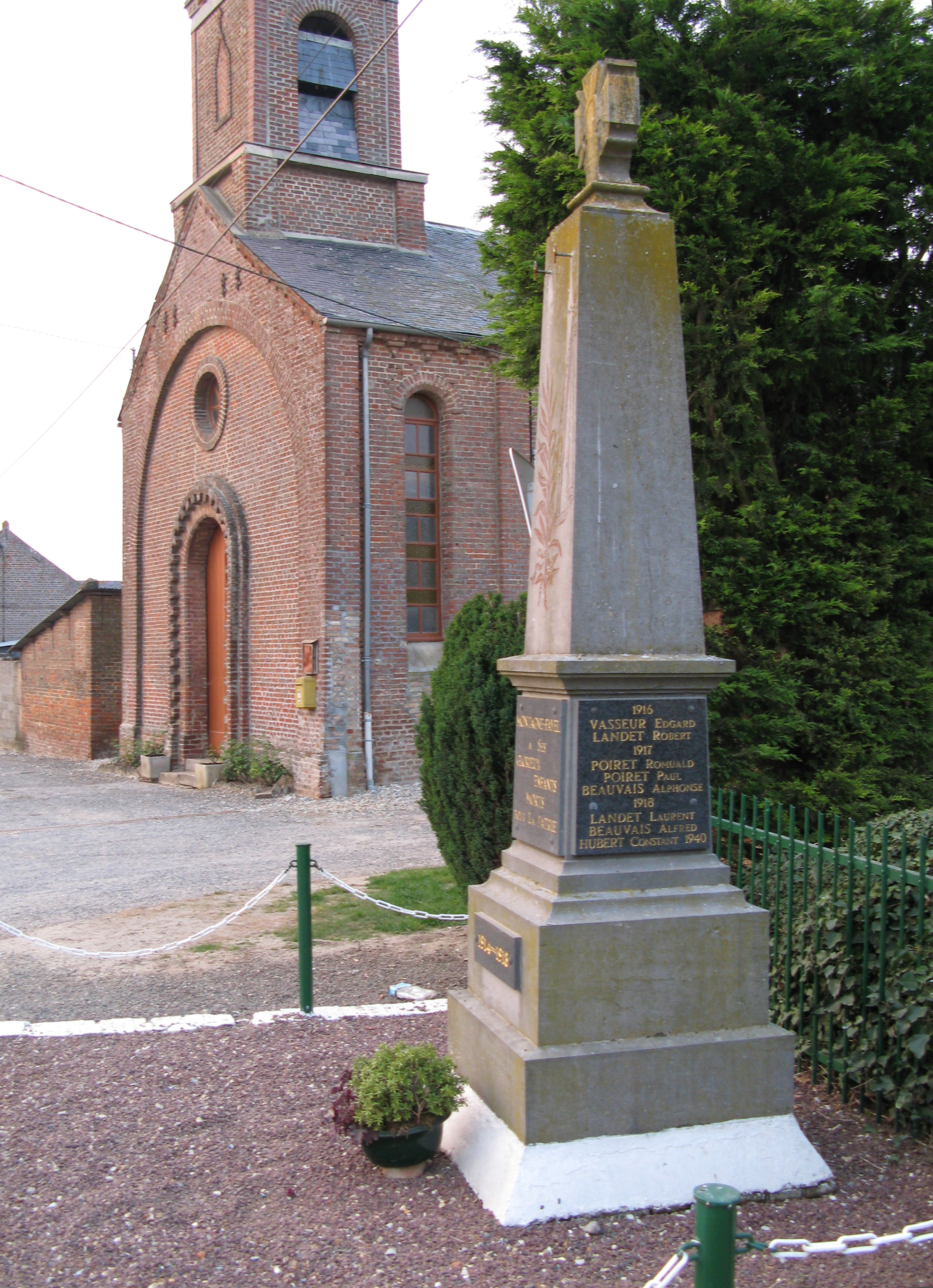 Montagne-Fayel (Somme, France)